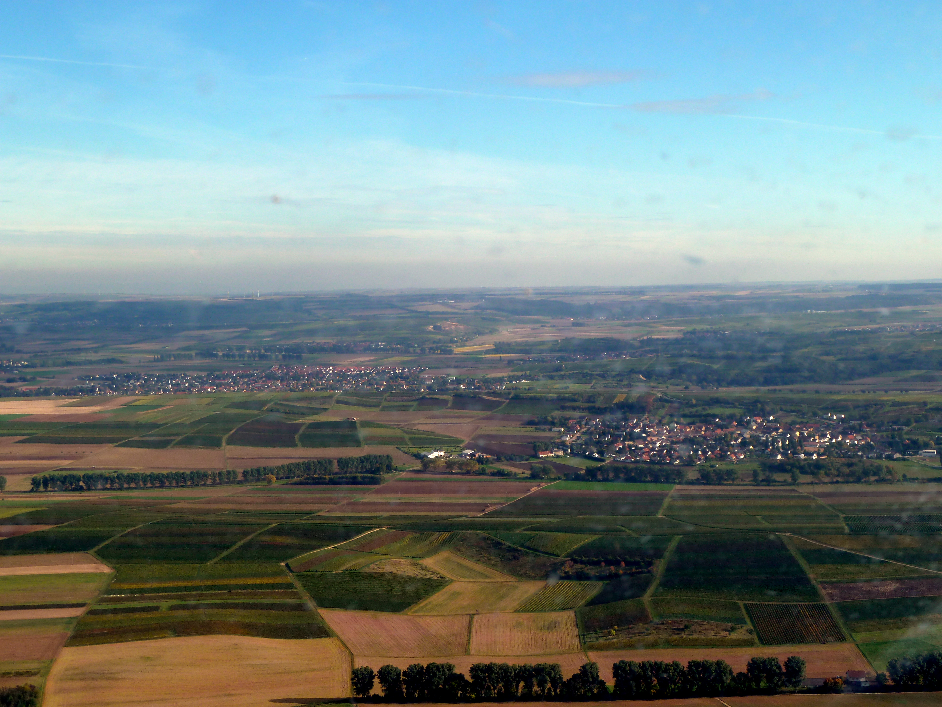 Rundflug Rhein-Nahe: Pfaffen-Schwabenheim und Sprendlingen